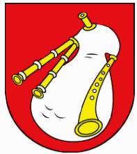 Erb obce Jacovce